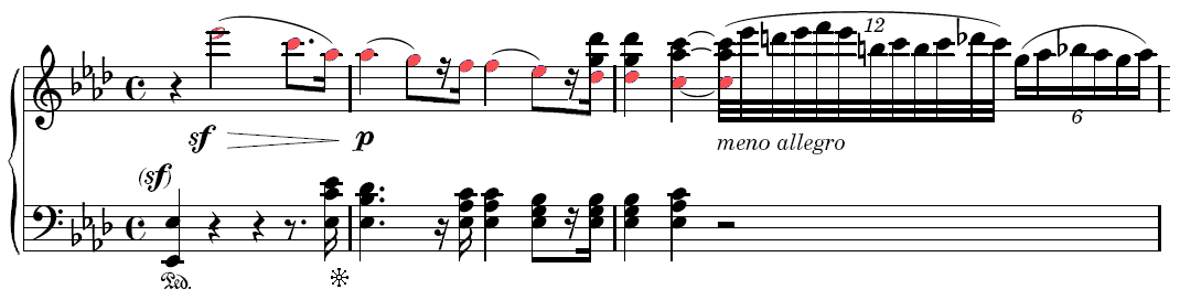 Second thème du premier mouvement de la Sonate pour piano nº 32, opus 111, de Ludwig van Beethoven